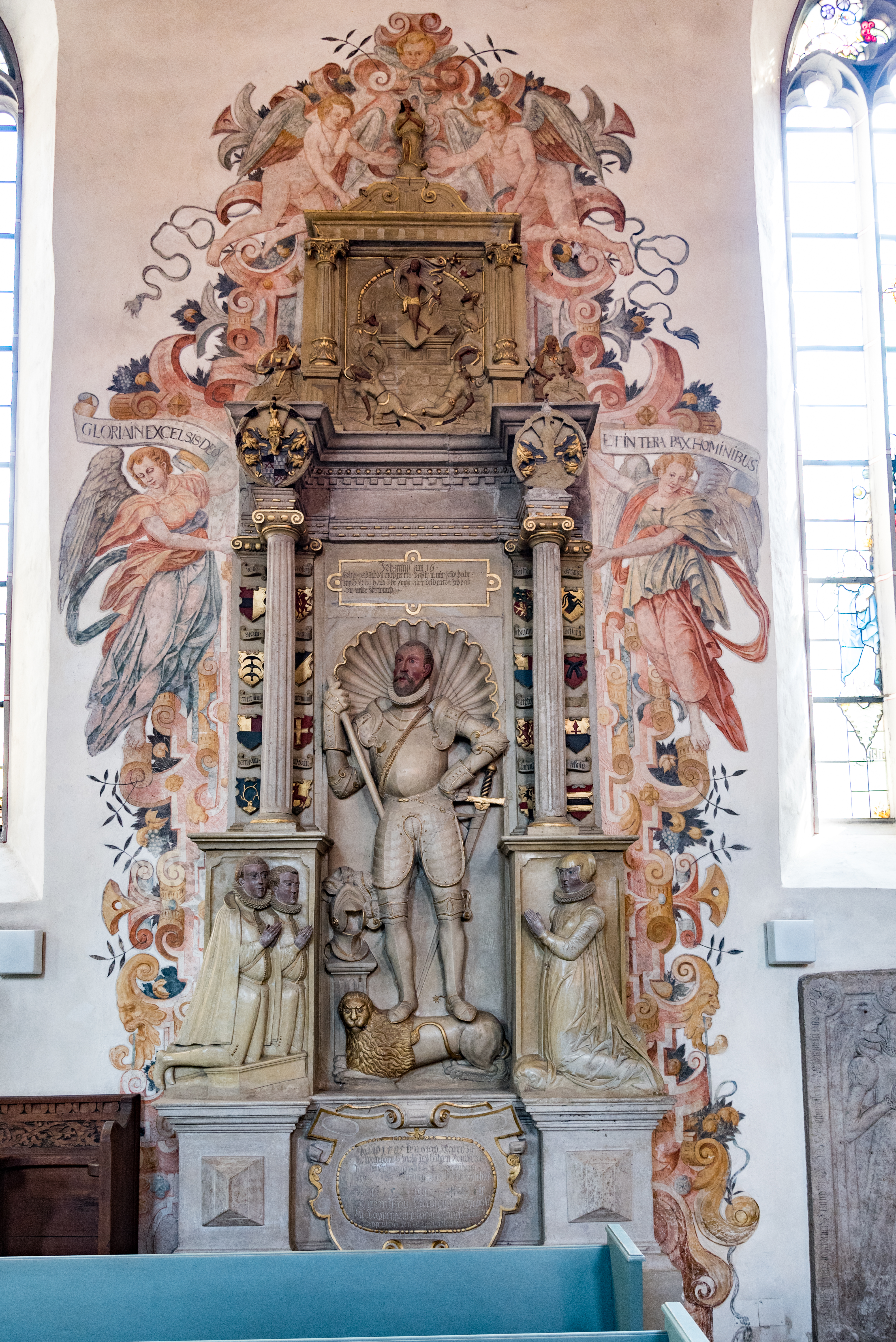 Pappenheim, Ev. Pfarrkirche, Epitaph Wolfgang von Pappenheim († 1585)